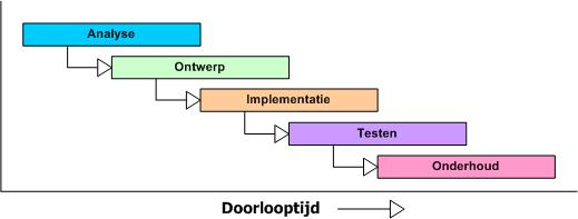 De correcte versie van het watervalmodel met overlappende fasen. Zie ook nl::Afbeelding:Waterval.jpg